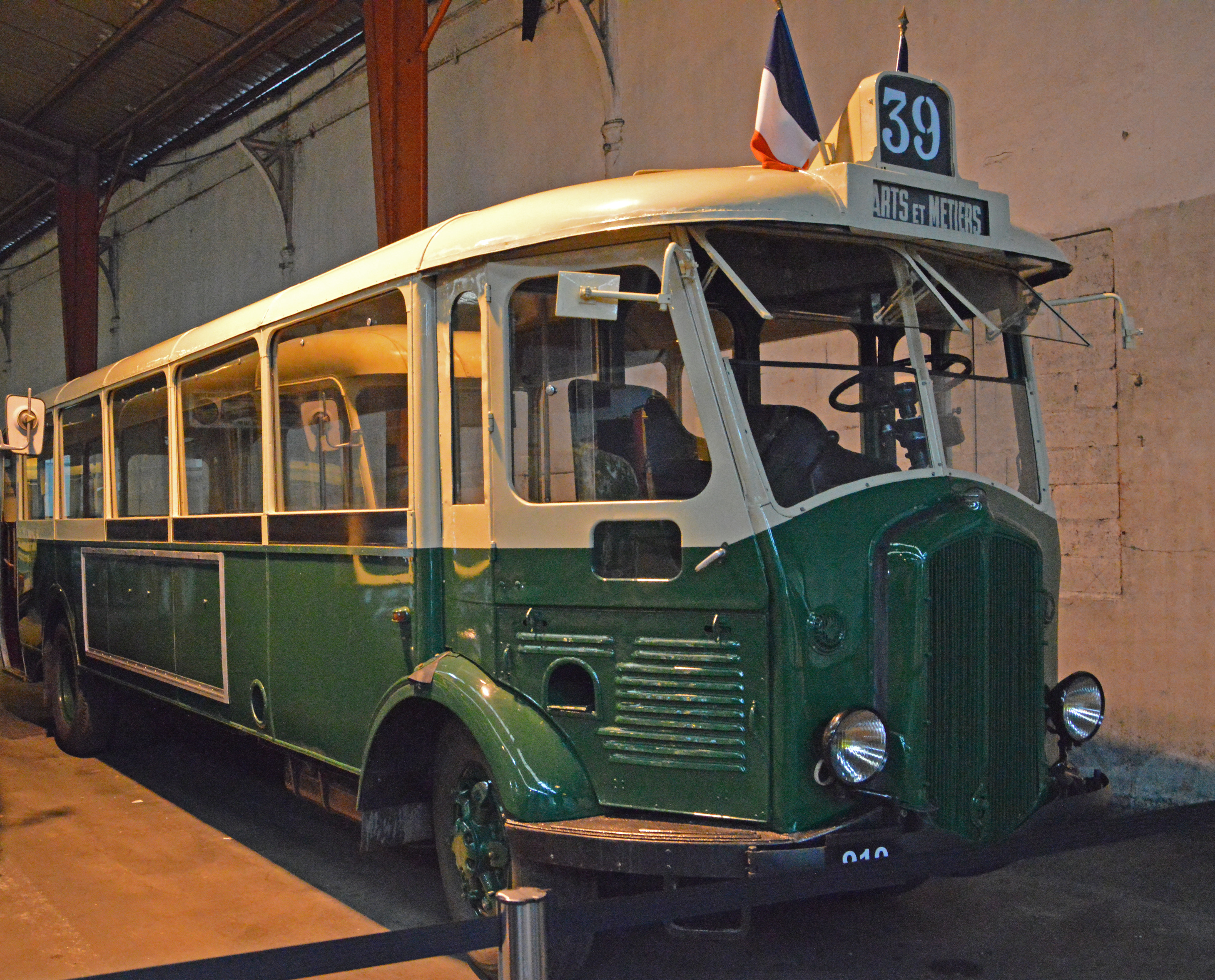 Un autobus Renault TN4H (1936-1971). (320R0063)